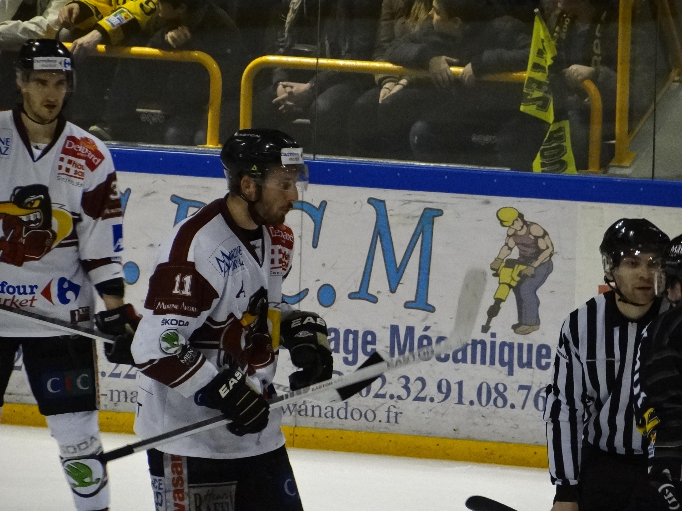 Photographie du joueur lors du premier match des quarts-de-finale de la Lige Magnus 2012-2013 contre Rouen